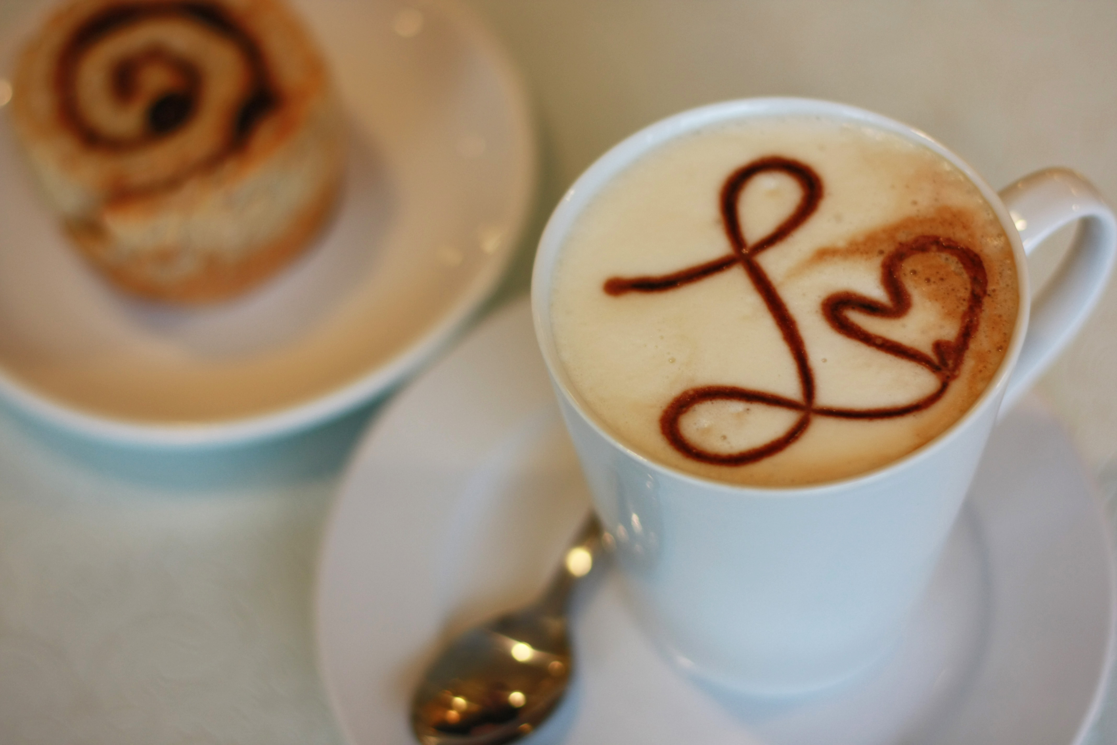 Vegan Caramel Latte